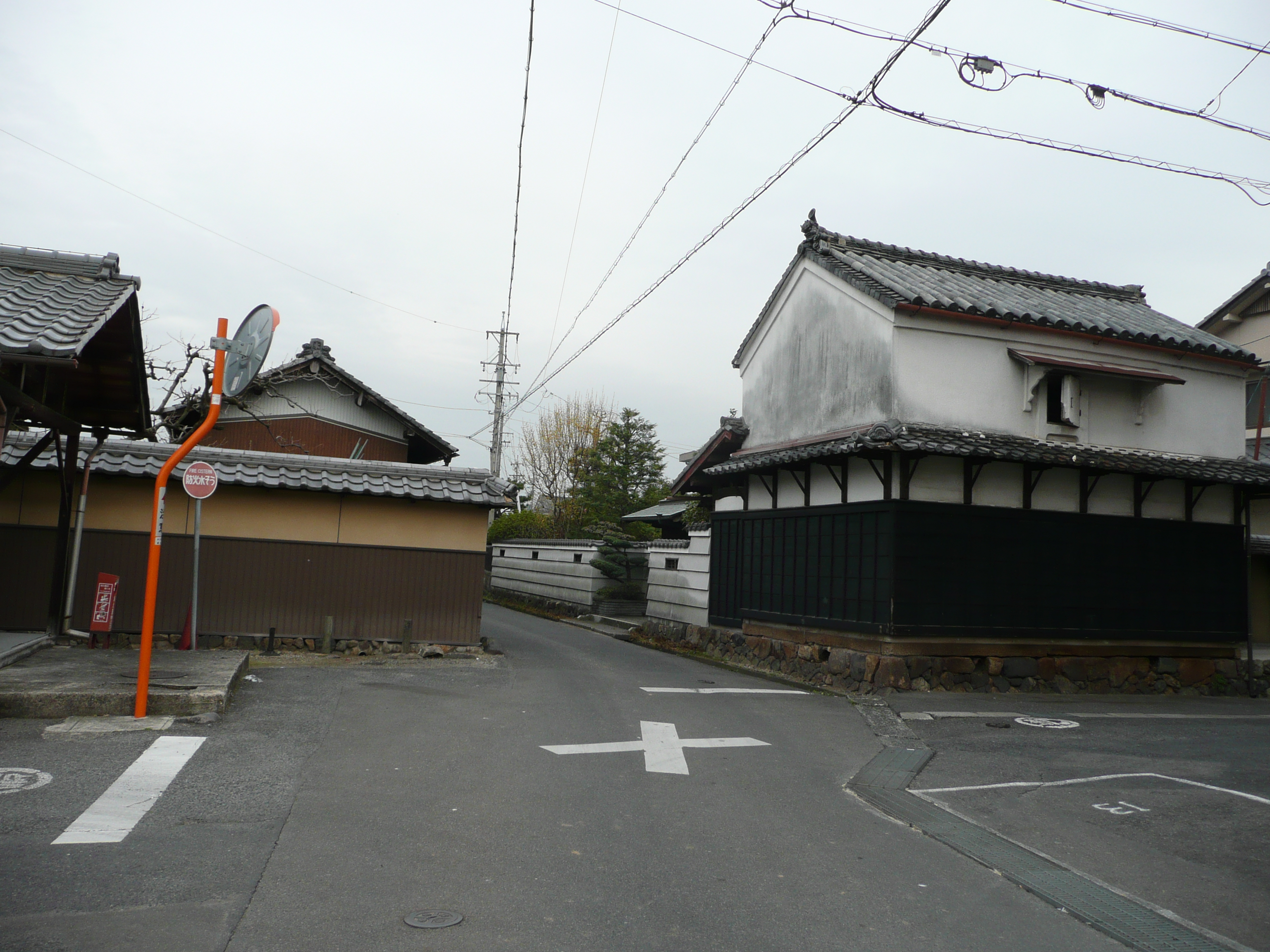 上条城の周りにある母屋。